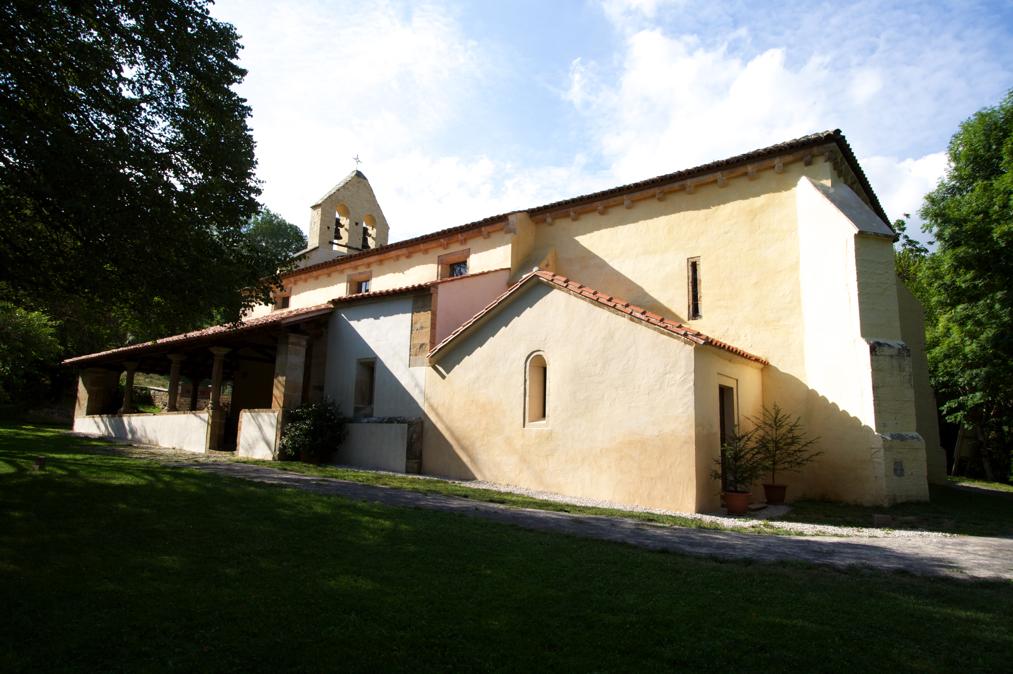 Iglesia de Santa María de Llas, concejo de Cabrales, Asturias.